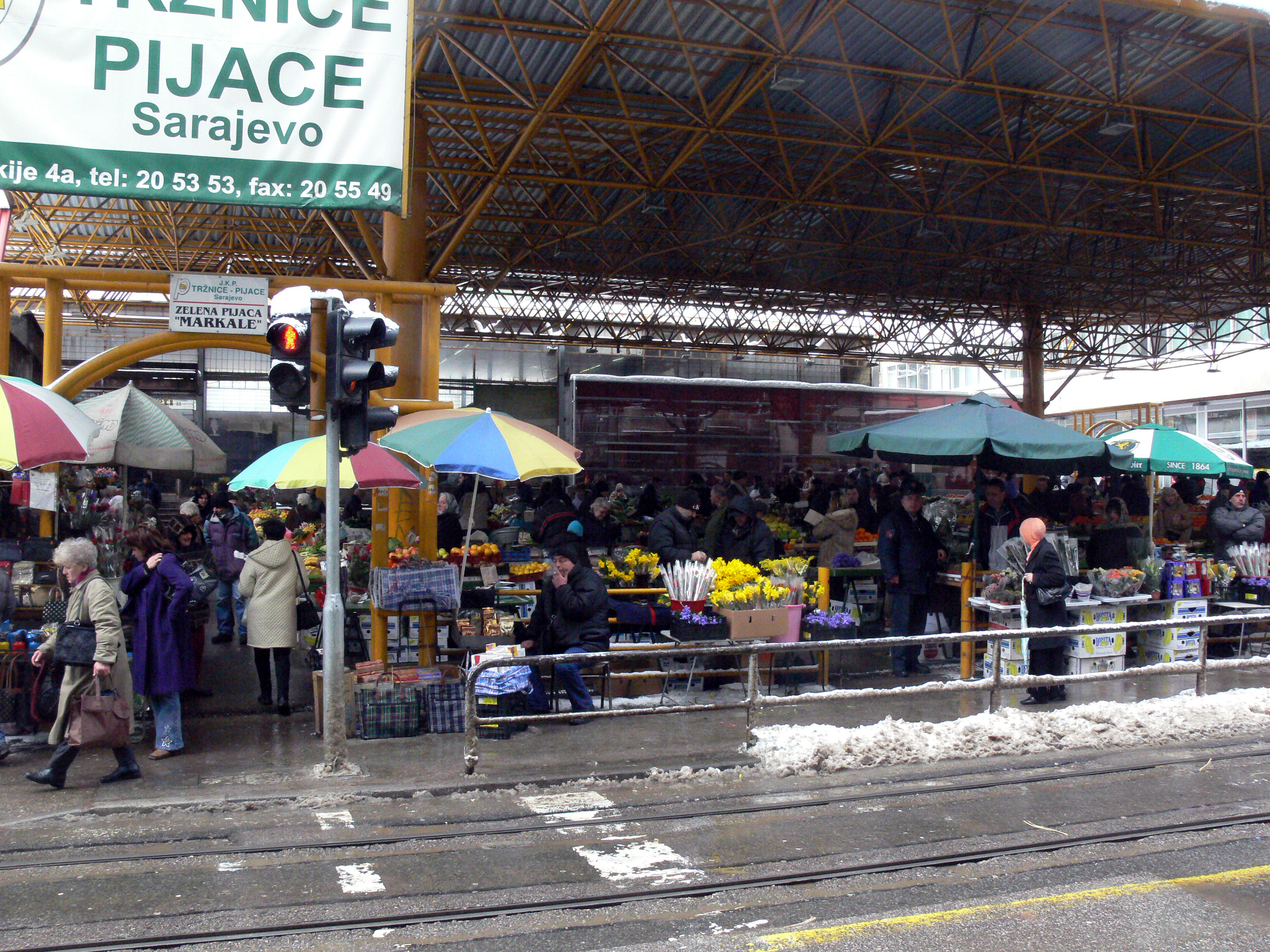 Sarajevo in Winter. Sarajevo market.